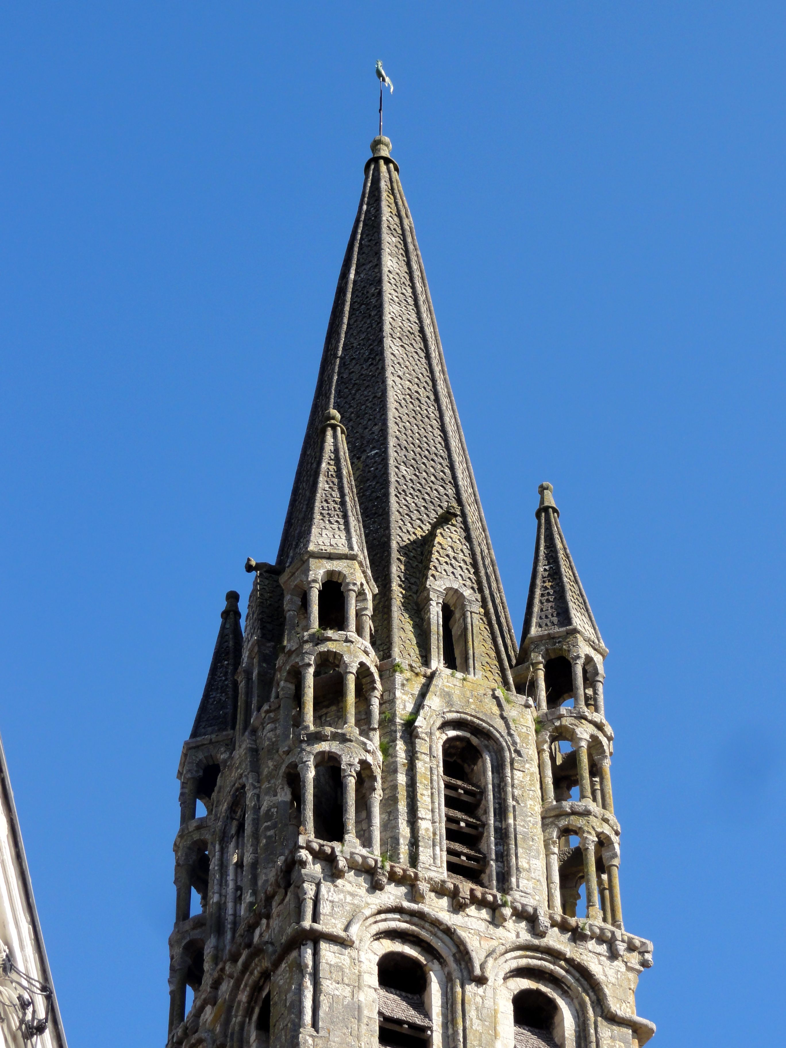 Clocher.